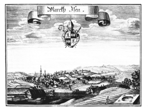 Kupferstich von Isen von Michael Wening